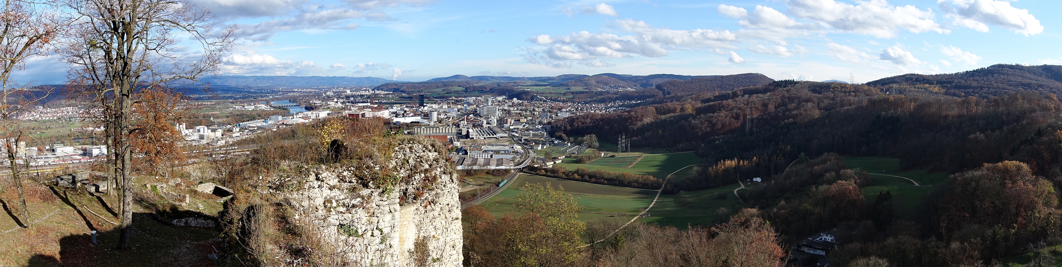 Vordere Ruine Wartenberg, Muttenz, Panorama Aussicht nach Pratteln und Kraftwerk